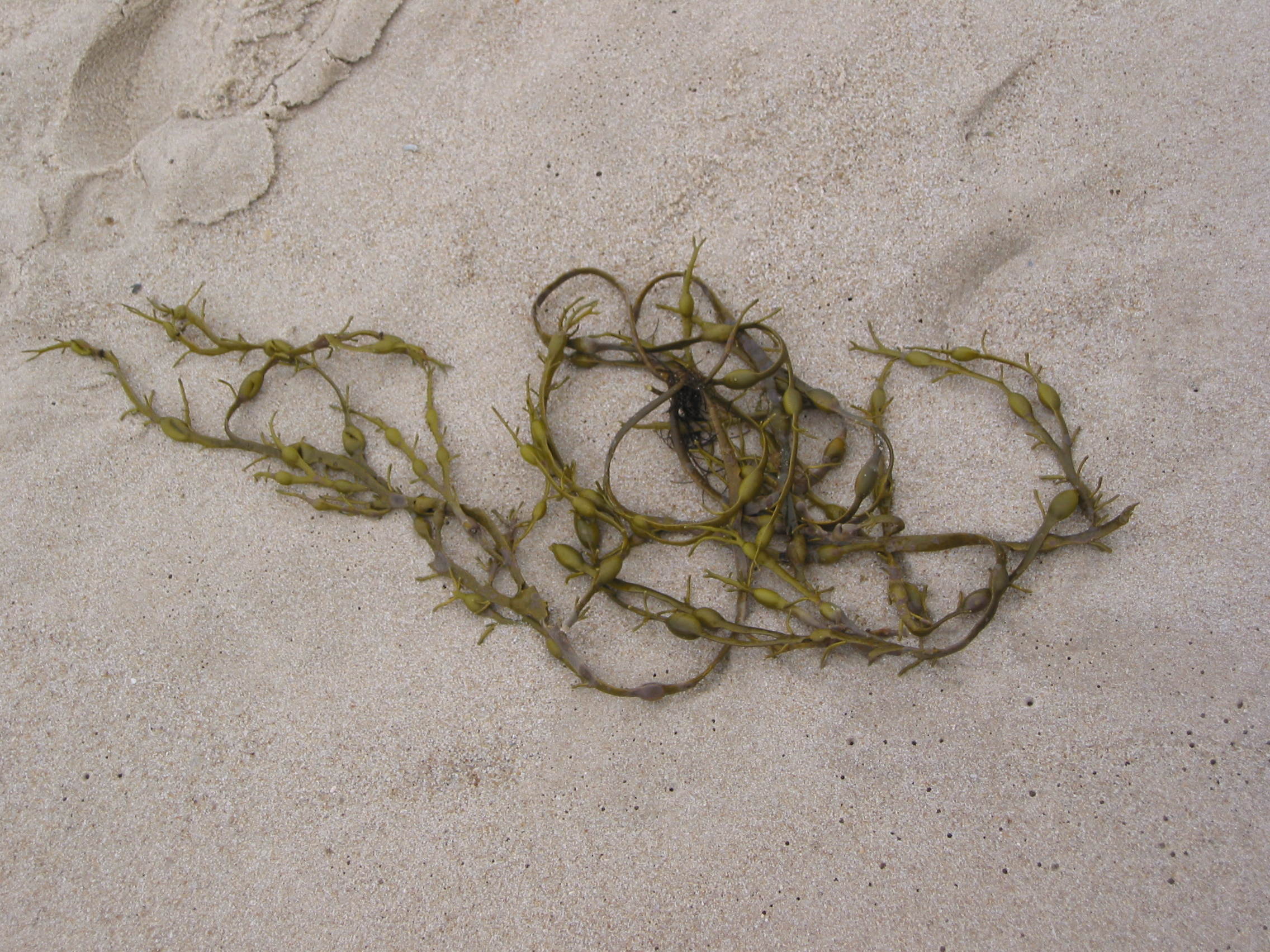 Seaweed (Westerland)